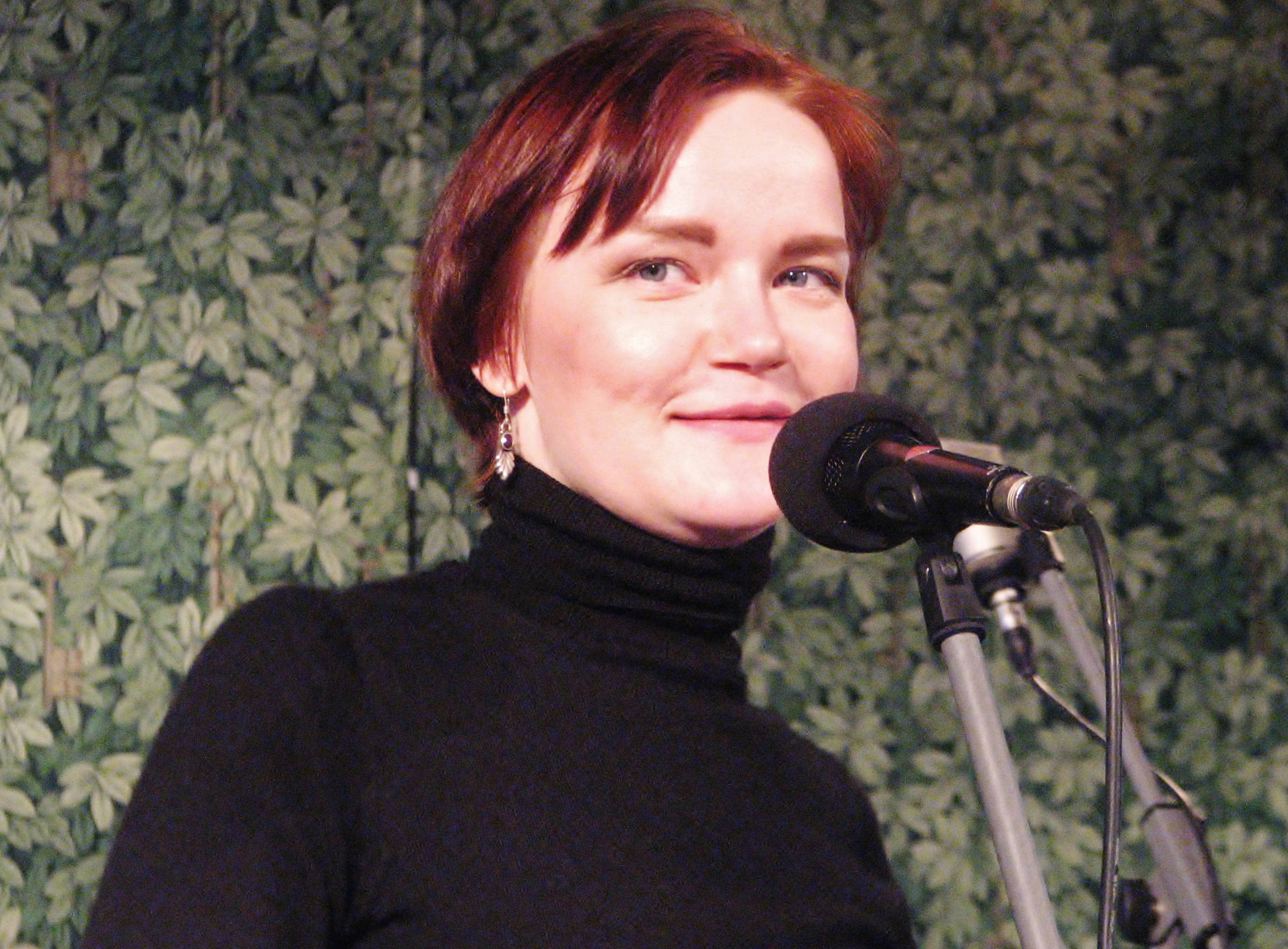 Triin Tasuja esinemas HeadReadil luulelahingu lõppvõistlusel Tallinna kirjanike maja musta laega saalis